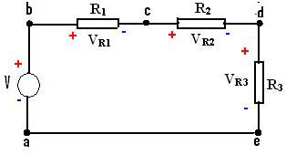 Skissa af Spennu Lögmálinu